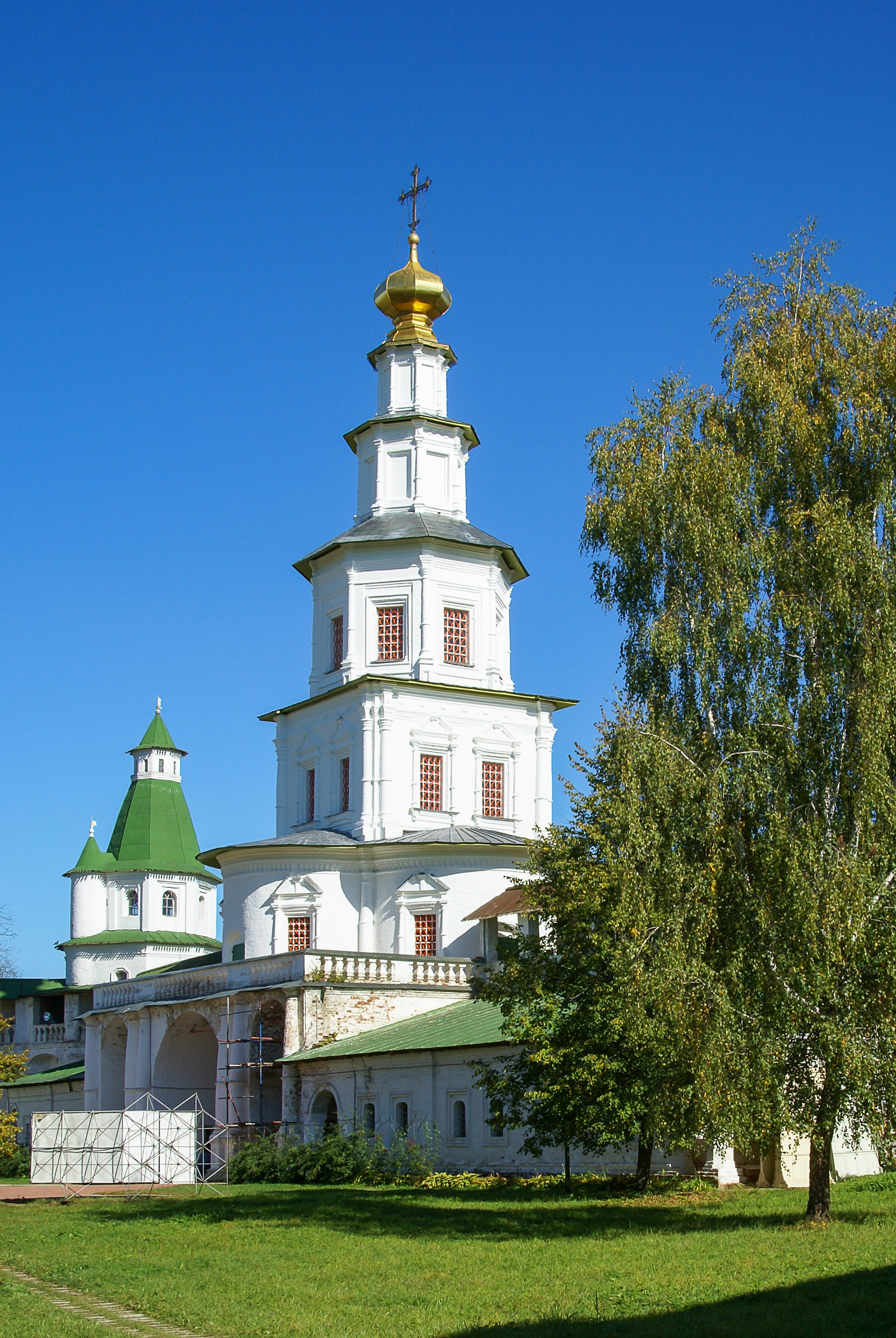 Надвратная церковь Входа Господня в Иерусалим: улица Советская, 2, Истра, Истринский район, Московская область